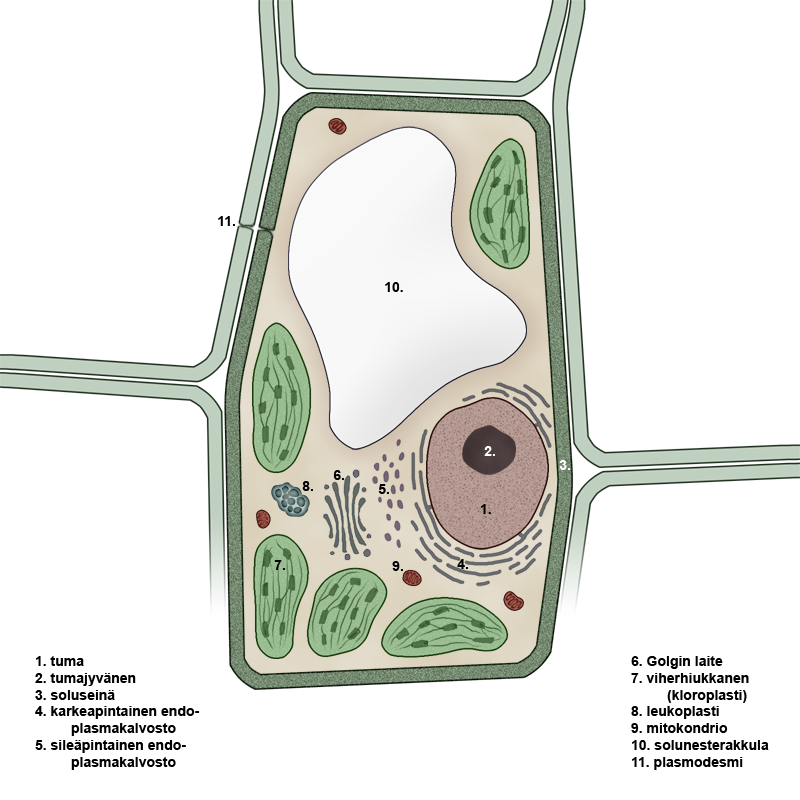 Kasvisolun rakenne.